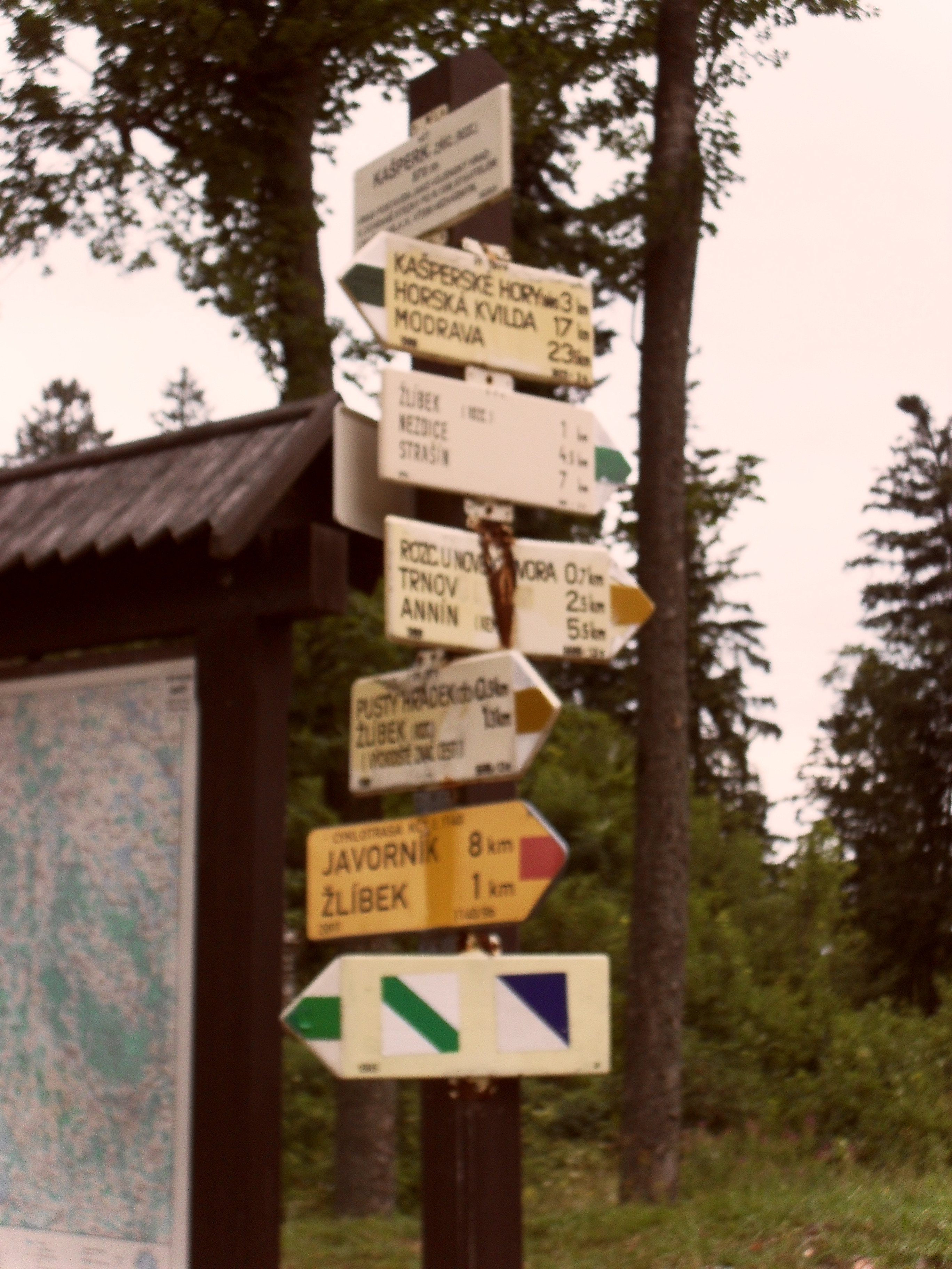 Hrad Kašperk, vycházkový okruh "Východní věž".